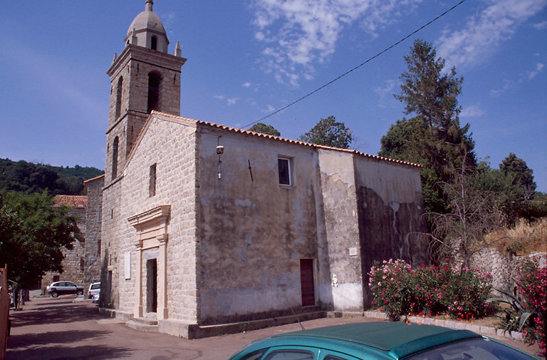 Eglise de l'Assomption